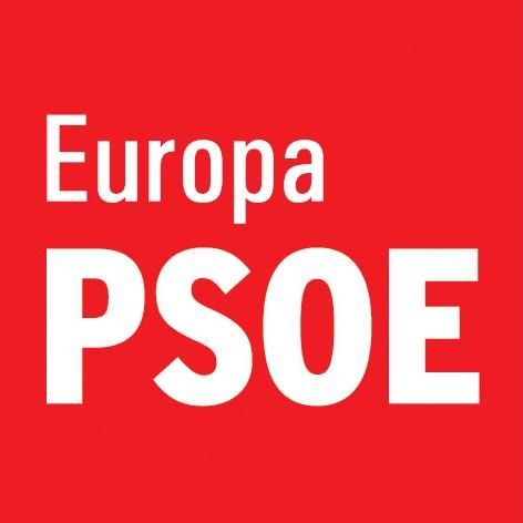 Primer cubo de la marca del PSOE Europa